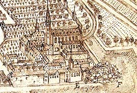 Das Kloster Maria Münster, Worms, vor der Zerstörung von 1689, Zeichnung von Peter Hammann, 1692